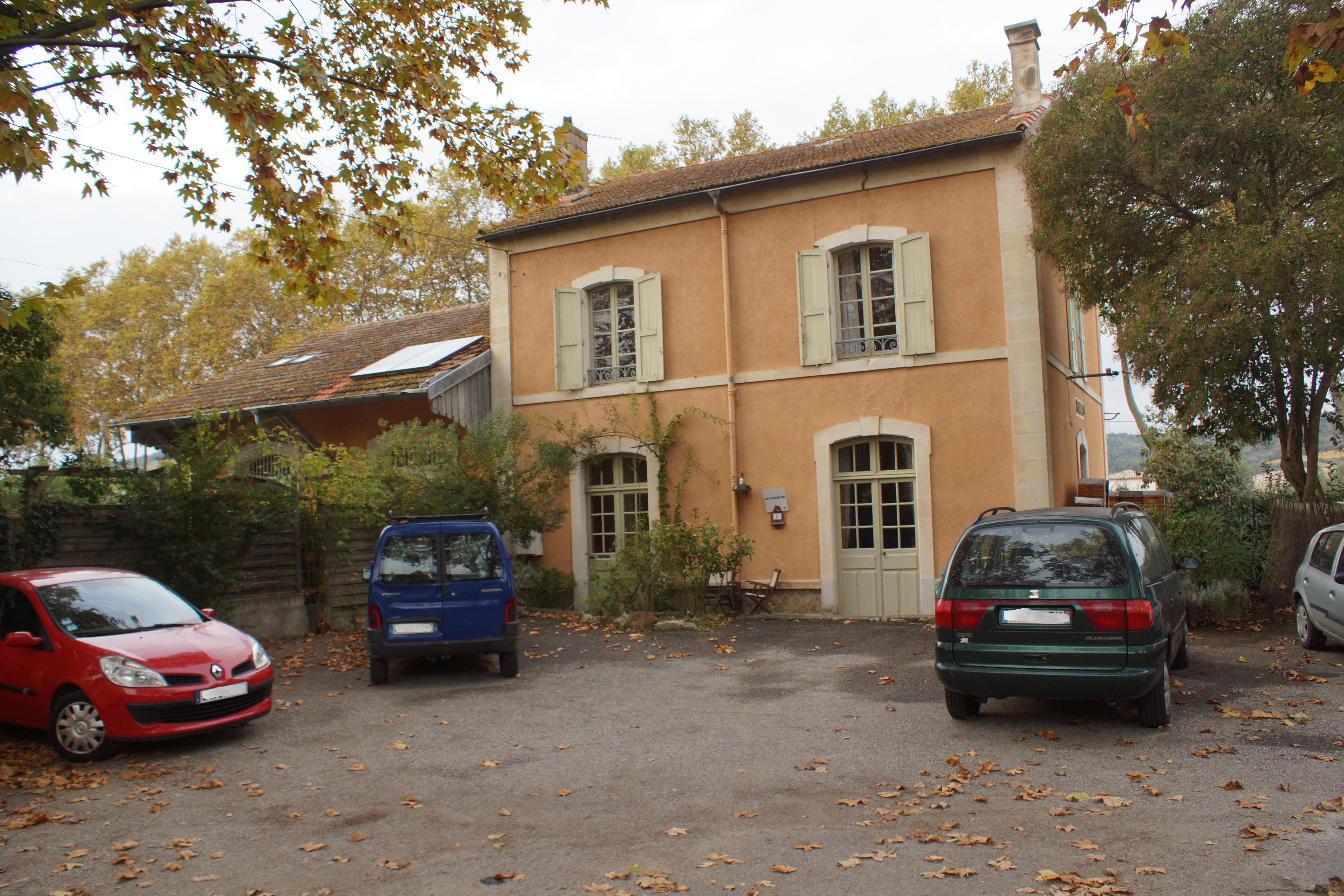 Gare de Pomas : l'ancien bâtiment voyageurs avec sa halle à marchandises accolée.